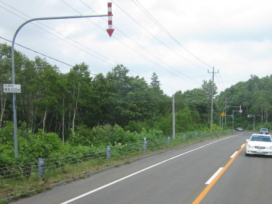 北海道 国道393号 毛無峠